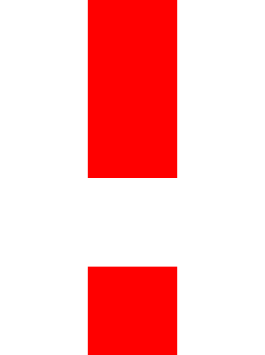 Логотип президентской кампании Алексея Навального 2018